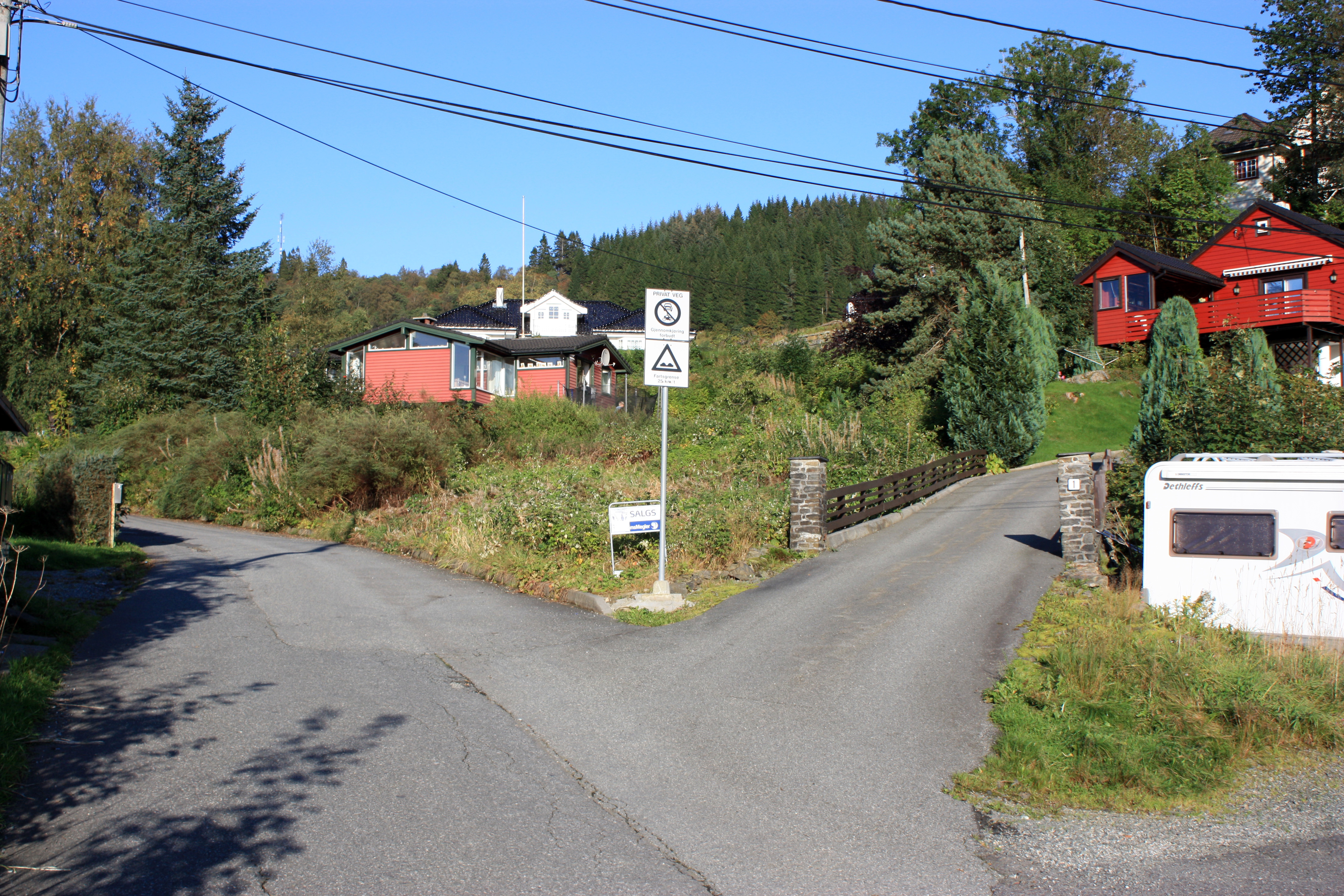 Midtunbrekka, Fana, Bergen.